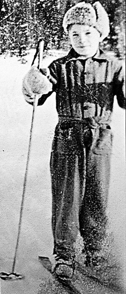 Suomalainen entinen hiihtäjä Eero Mäntyranta hiihtämässä mäystinsuksilla vuonna 1948 tai 1949 Turtolan/Pellon kunnassa.